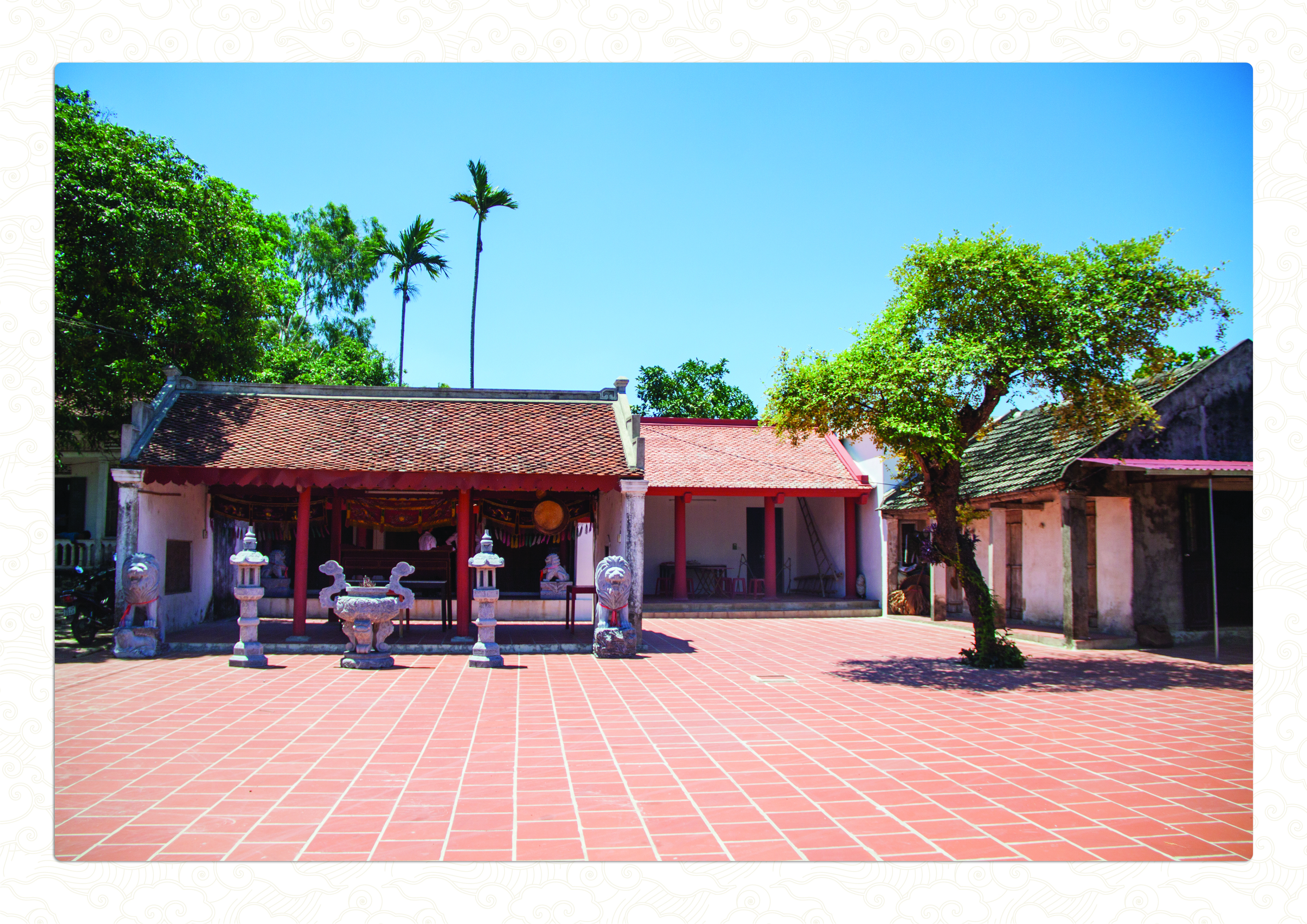 Chụp năm 2015